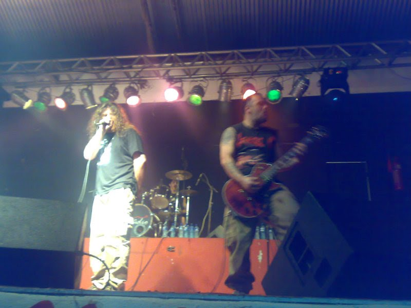 Show do Matanza em João Pessoa, no Clube Cabo Branco em 2011